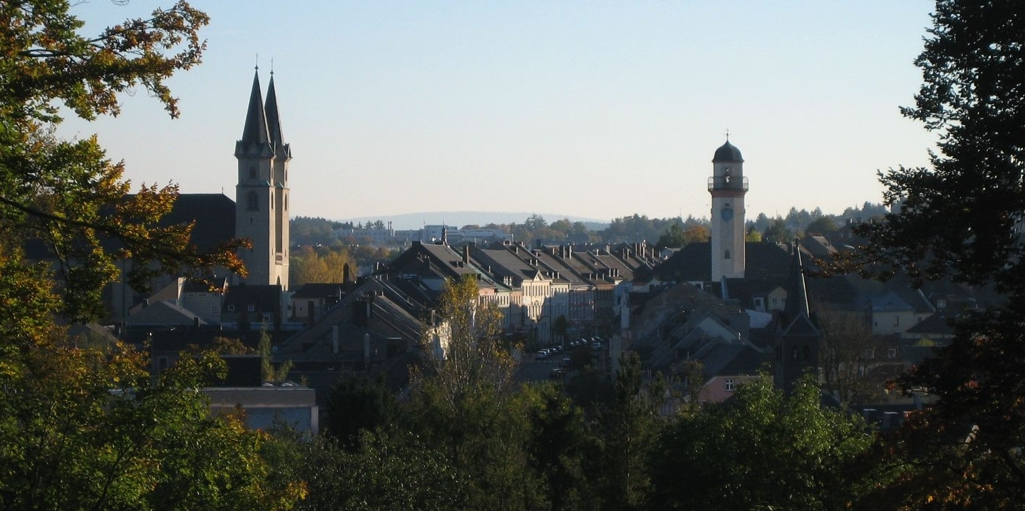 Hof (Saale): Blick vom Theresienstein auf St. Michaelis Kirche, Rathaus und Ludwigstraße